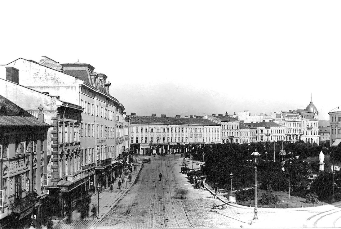 старе фото